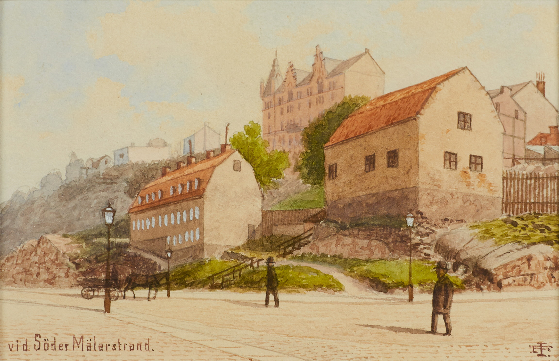 "Vid Söder Mälarstrand" av den svenska konstnären Fredrik Isberg. Målningen avbildar Öbergska gården till vänster och till höger det så kallade Kopparslagarhuset, båda utmed Torkel Knutssonsgatan på Södermalm i Stockholm.